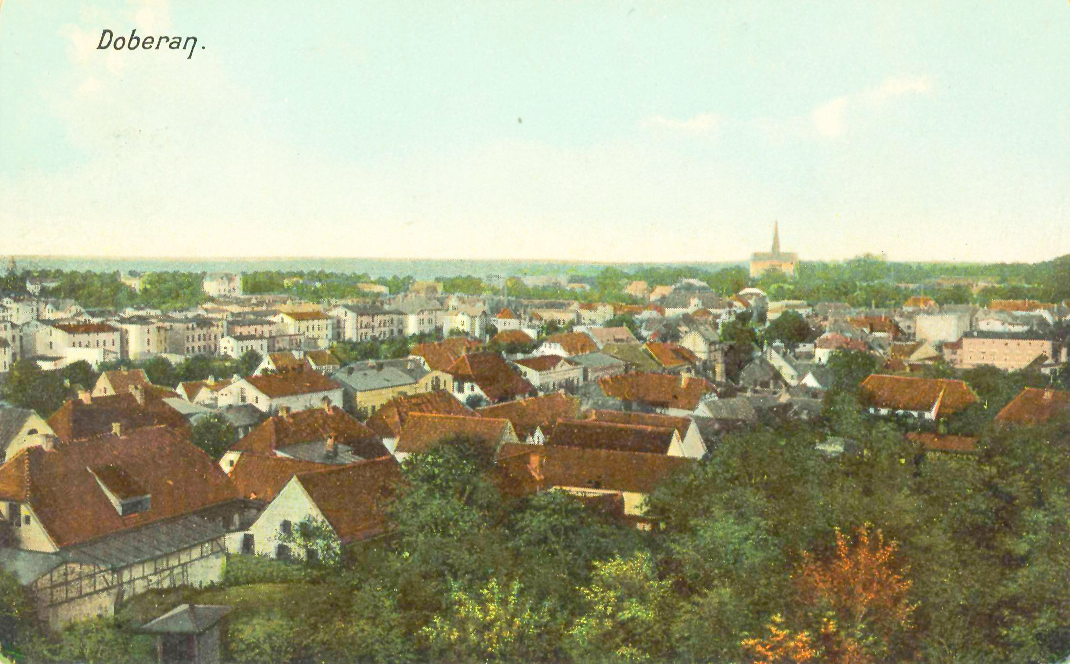 Bad Doberan, Mecklenburg-Vorpommern: Stadtansicht um 1900